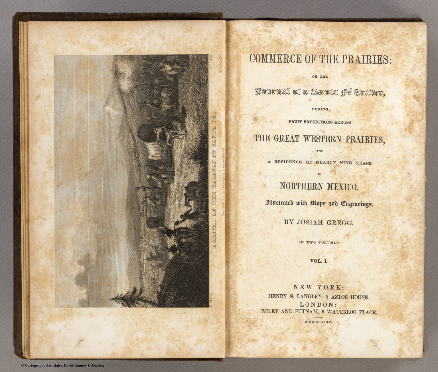 Oeuvre de Josiah Gregg